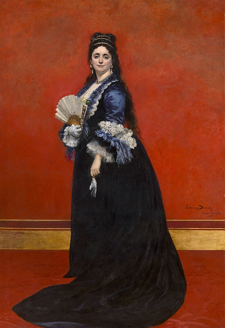 Portrait de Mevrouw de Rute, née Marie Laetitia Bonaparte-Wyse par Carolus-Duran, conservé au musée royal des Beaux-Arts d'Anvers